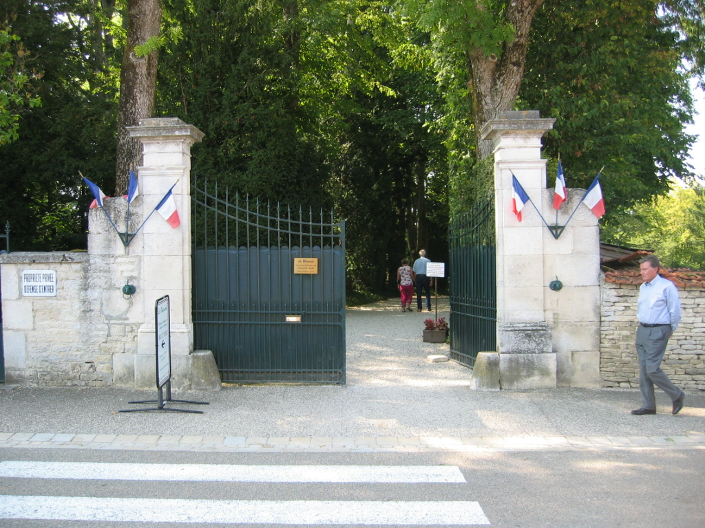 La Boisserie - Résidence Du généralle De Gaule à Colombey les 2 églises